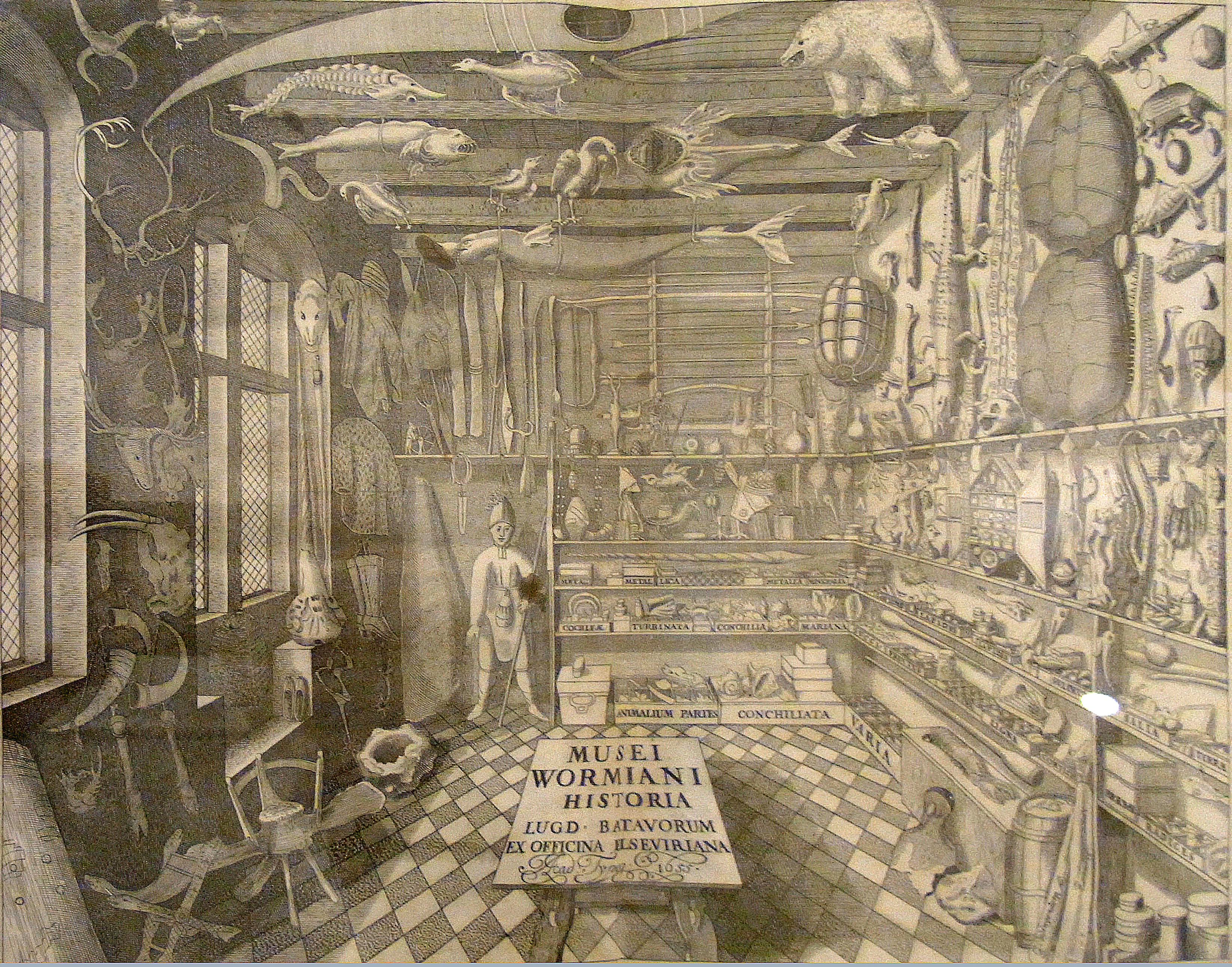 Ole Worm 1655 Universitätsbibliothek Augsburg